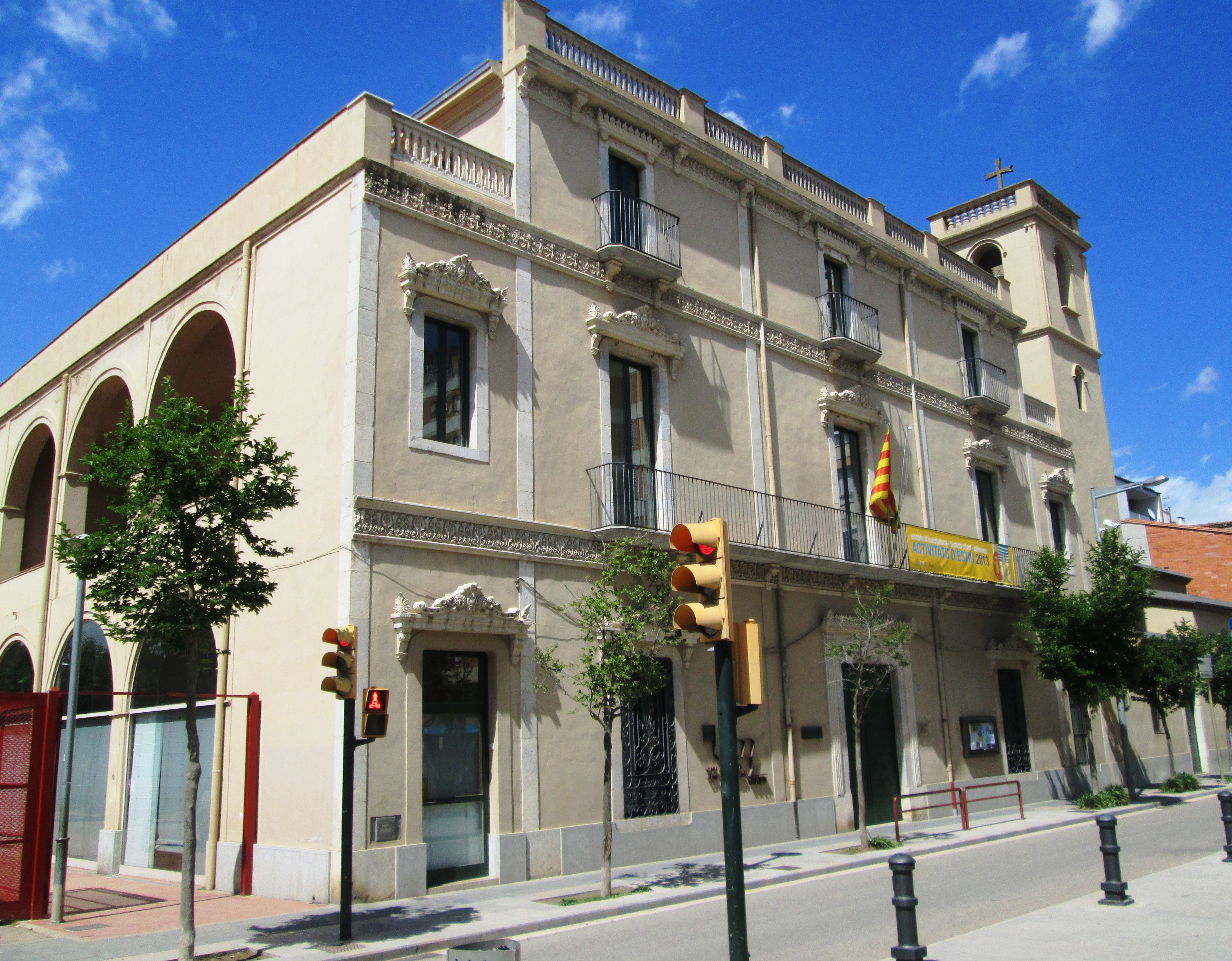 Les Bernardes, antic Can Tarrés, a Salt (Gironès)